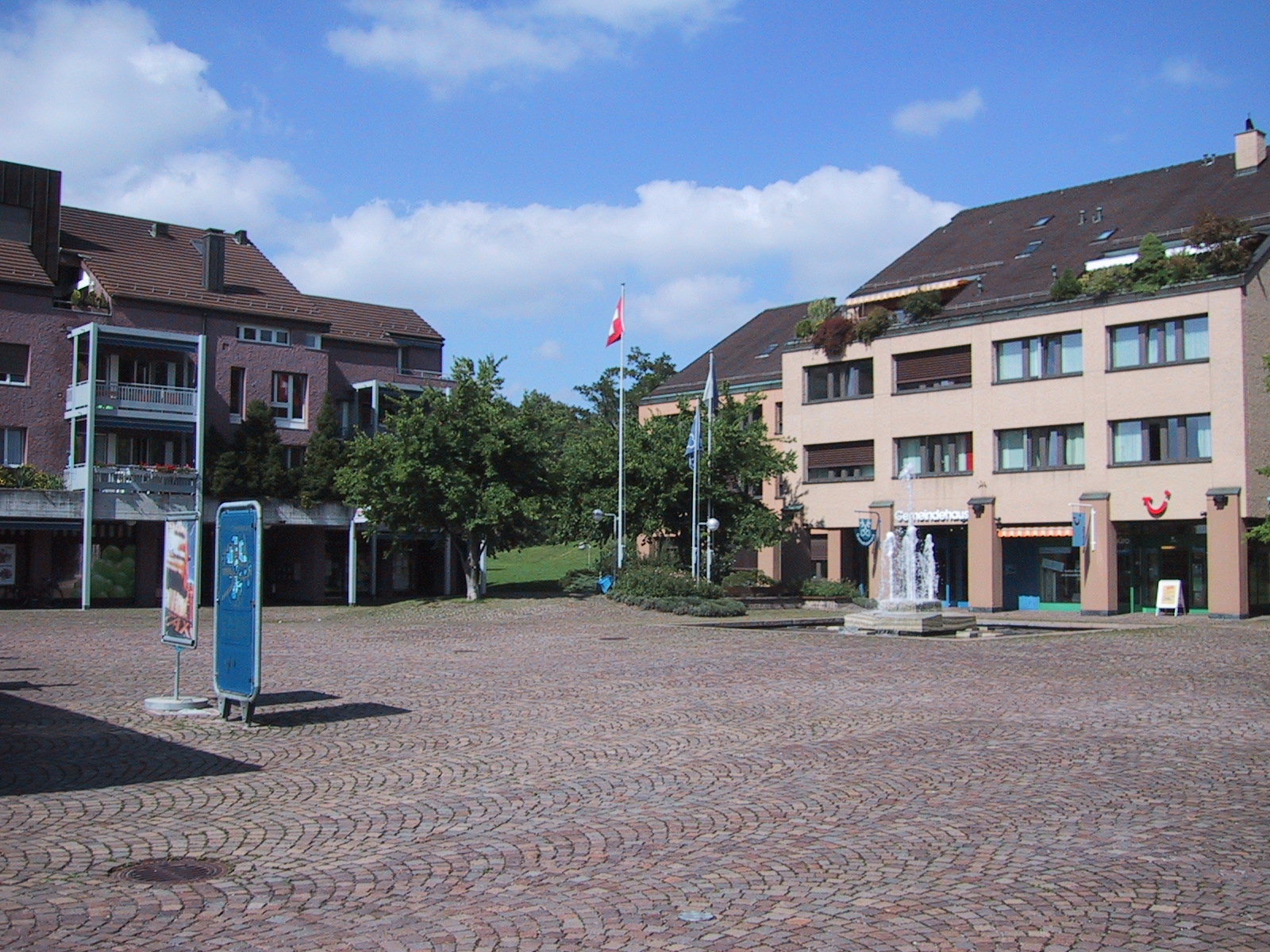 Aufnahme 17. August 2005, Dorfplatz mit Gemeindehaus im Zumikon, Kanton Zürich. Fotograf Peter Berger (selbst fotografiert). Lizenzstatus "GNU-FDL"